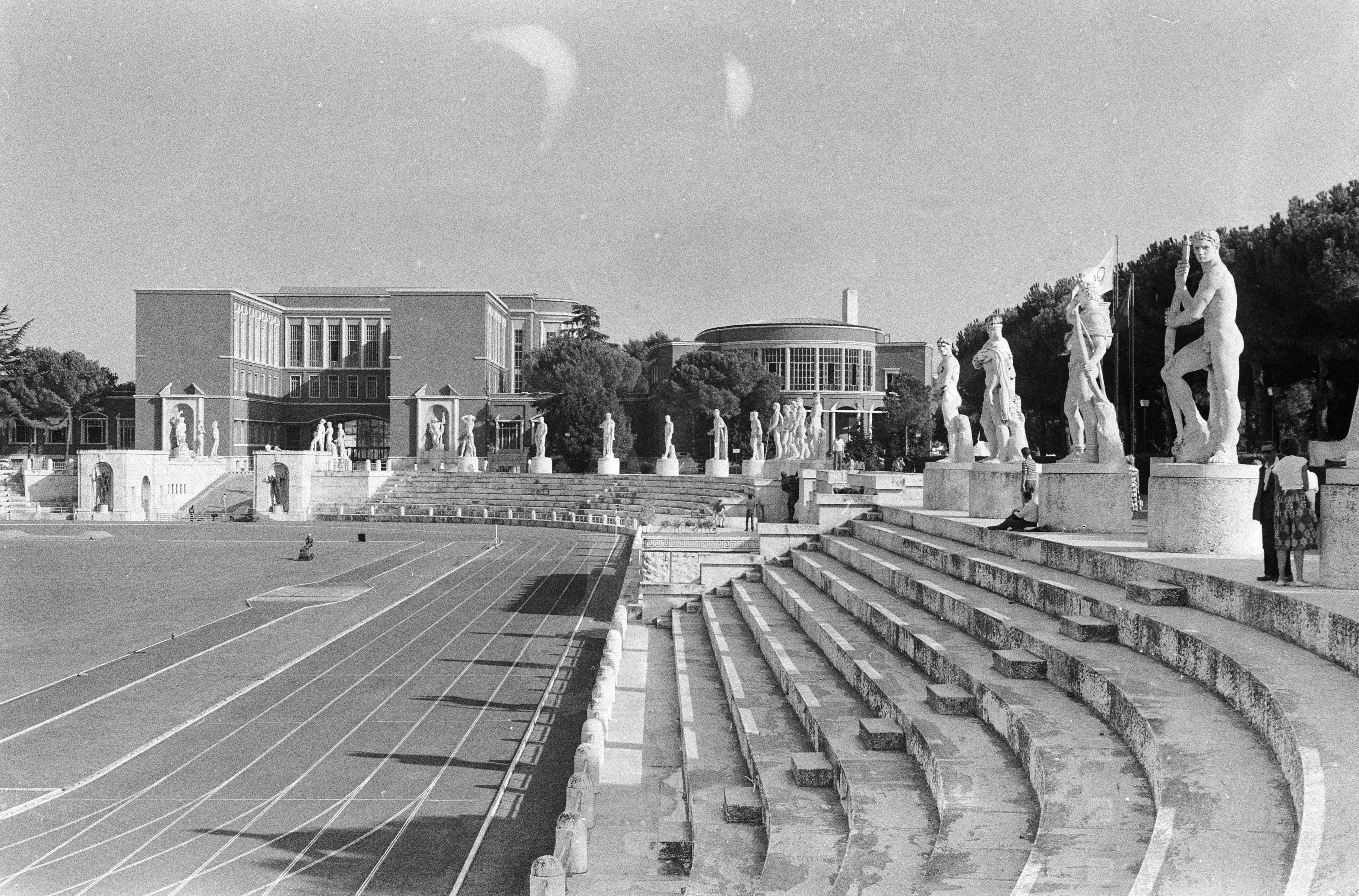 Collectie / Archief : Fotocollectie Anefo Reportage / Serie : [ onbekend ] Beschrijving : Olympische Spelen te Rome, sintelbaan in het Stadio dei Marmi Annotatie : Dit stadion, gebouwd tussen 1928 en 1932, werd alleen gebruikt voor enkele hockeywedstrijden en een aantal ceremoniëen Datum : 23 augustus 1960 Locatie : Rome Trefwoorden : stadions Instellingsnaam : Olympisch Stadion, Sintelbaan Fotograaf : Pot, Harry / Anefo Auteursrechthebbende : Nationaal Archief Materiaalsoort : Negatief (zwart/wit) Nummer archiefinventaris : bekijk toegang 2.24.01.05 Bestanddeelnummer : 911-5253